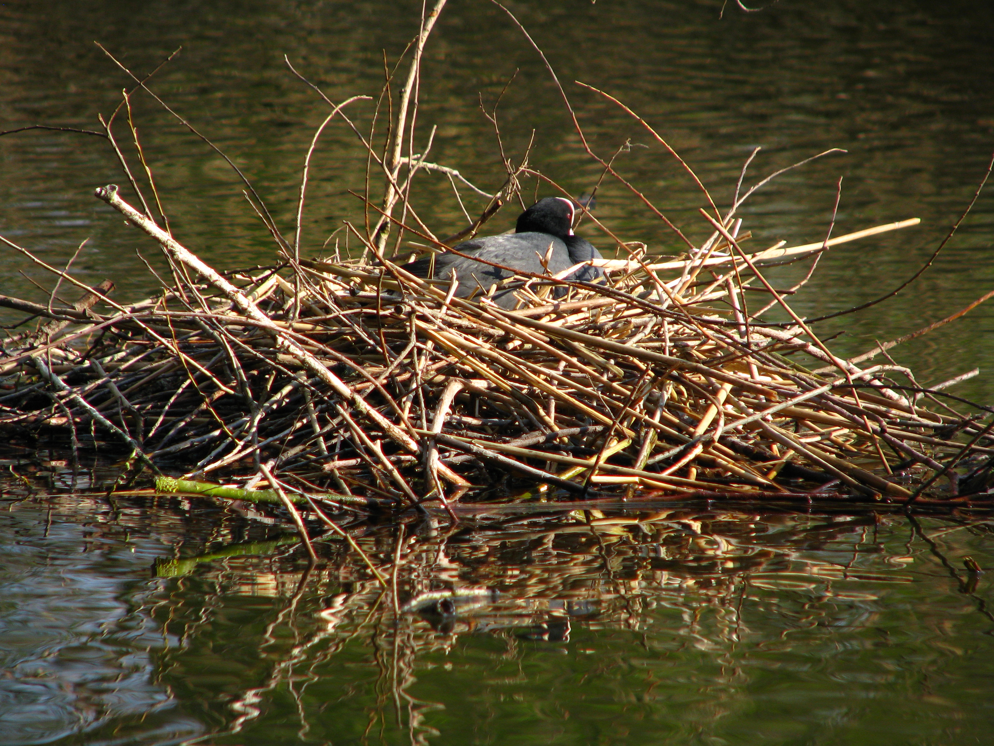 Limmat in Dietikon near Glanzenberg